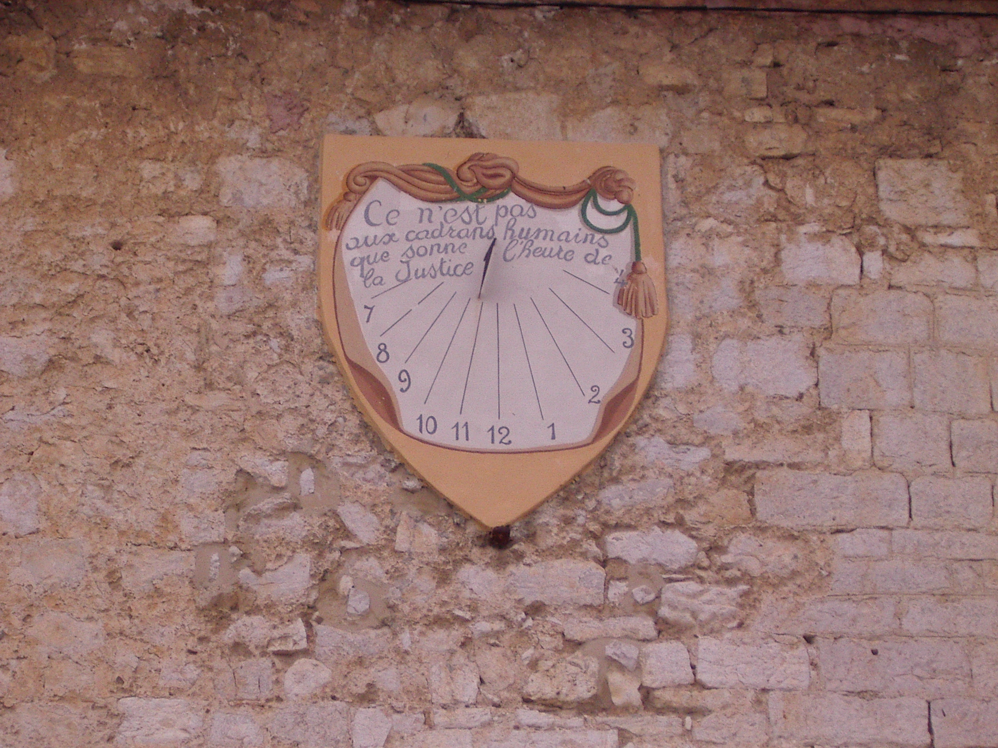 Cadran solaire de Tourrettes-sur-Loup, Alpes-Maritimes, France